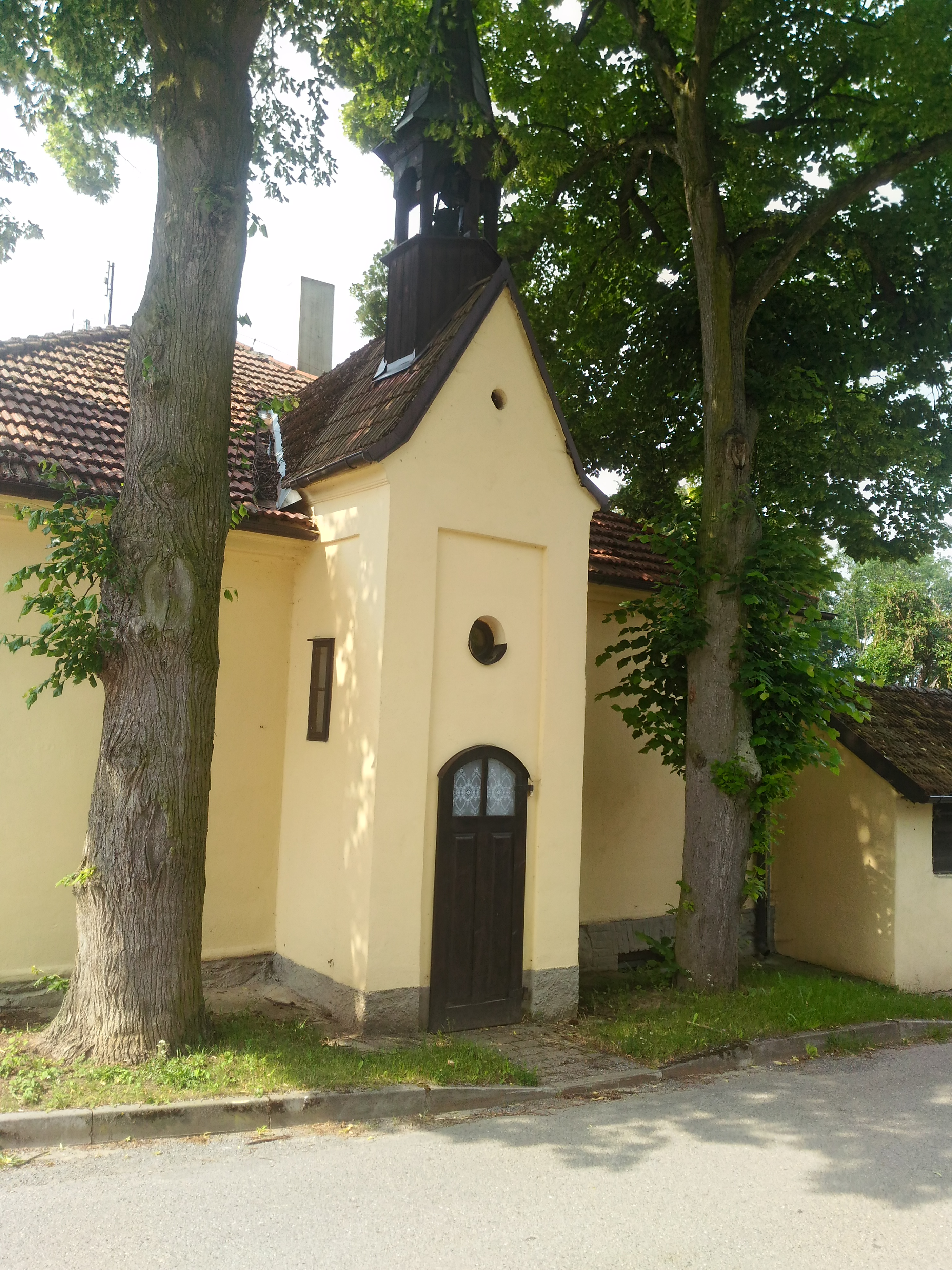 Radimovice u Tábora, okres Tábor, Česká republika